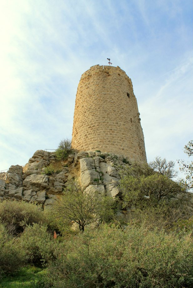 Tour Barberousse